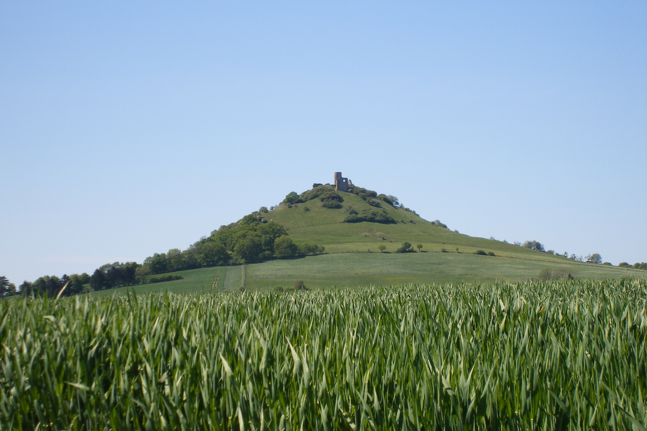 Den Desenberg von außen